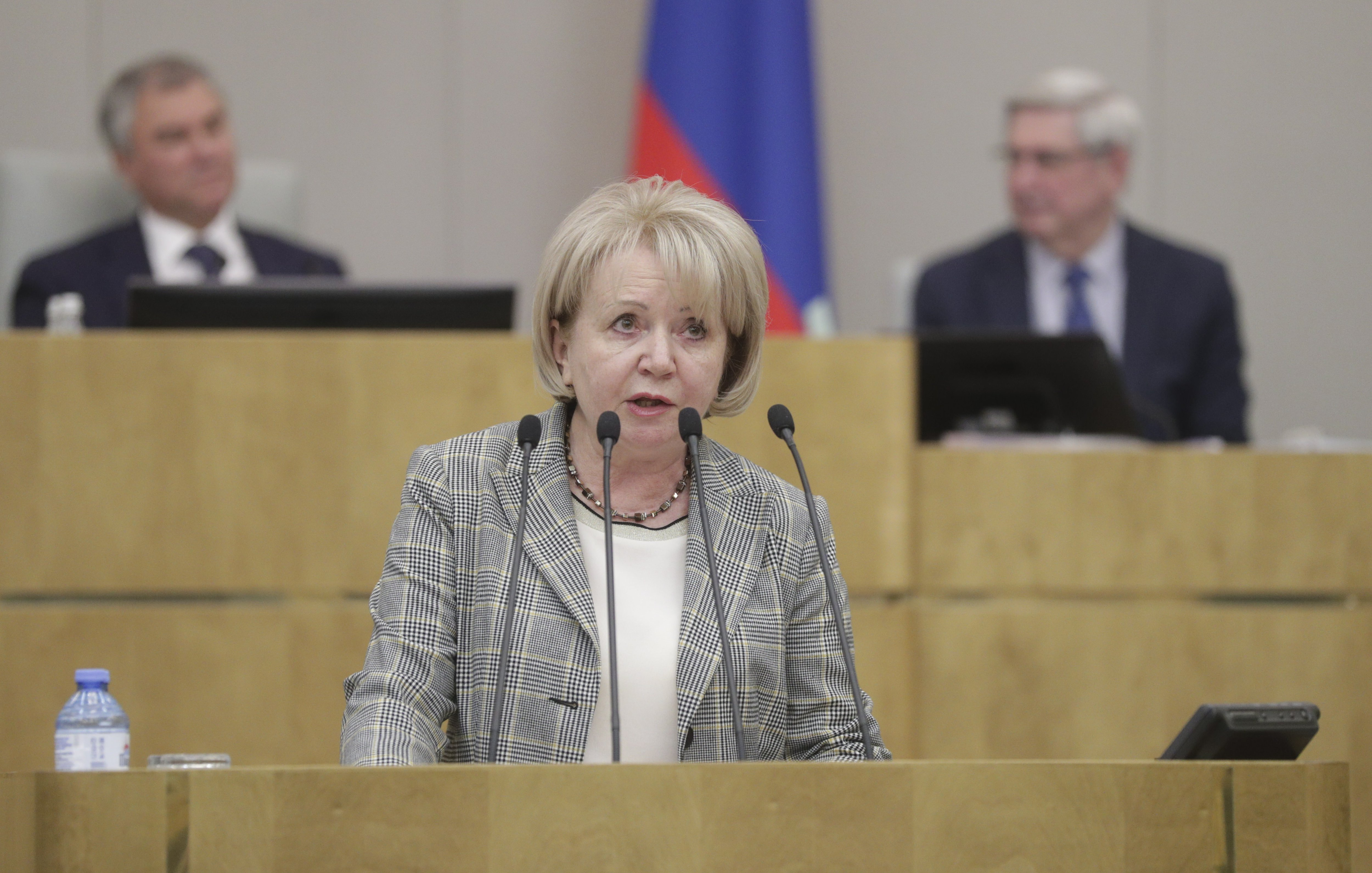 Председатель партии «Яблоко» Эмилия Слабунова